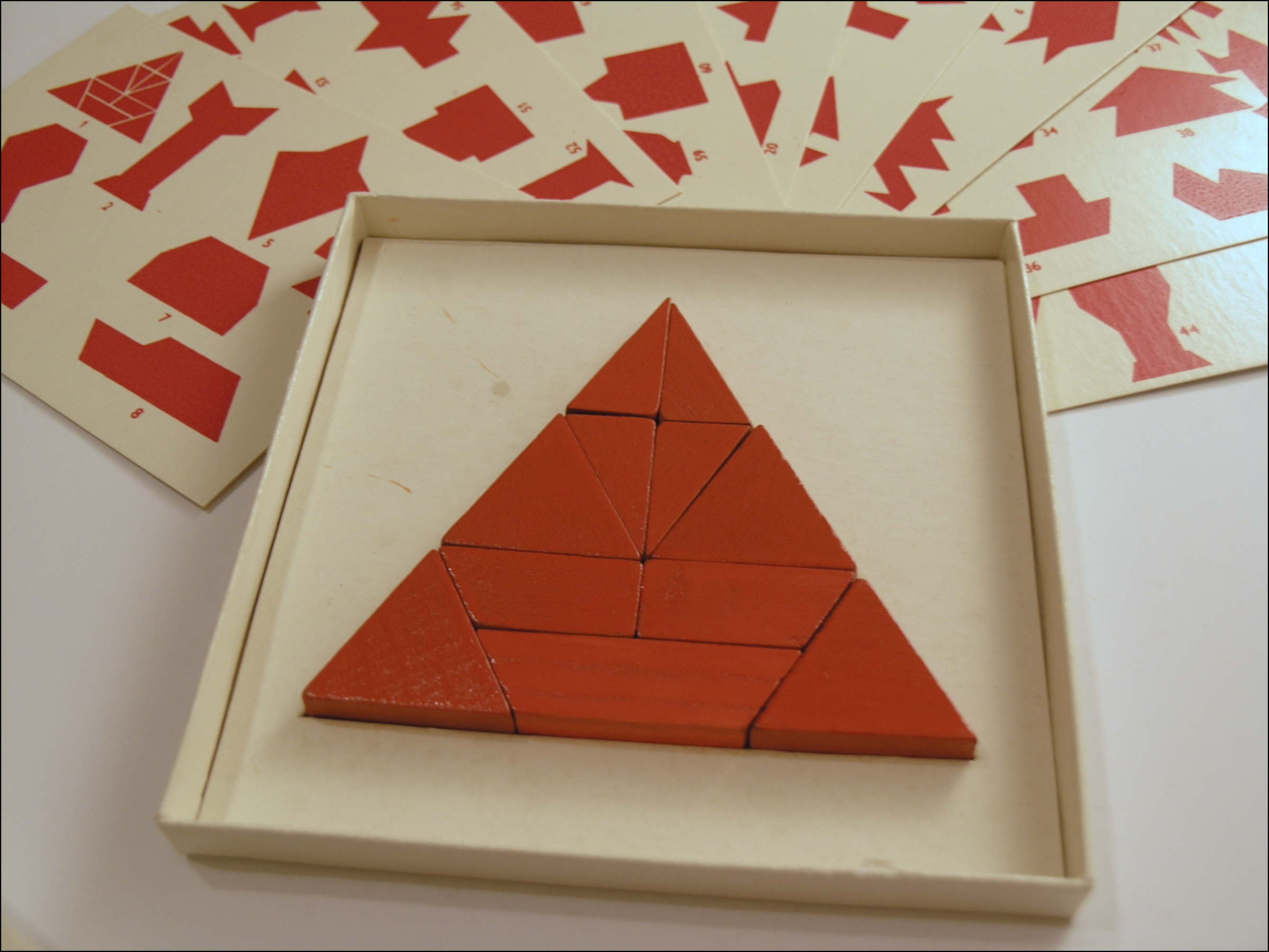 Tangram Bermudský trojúhelník